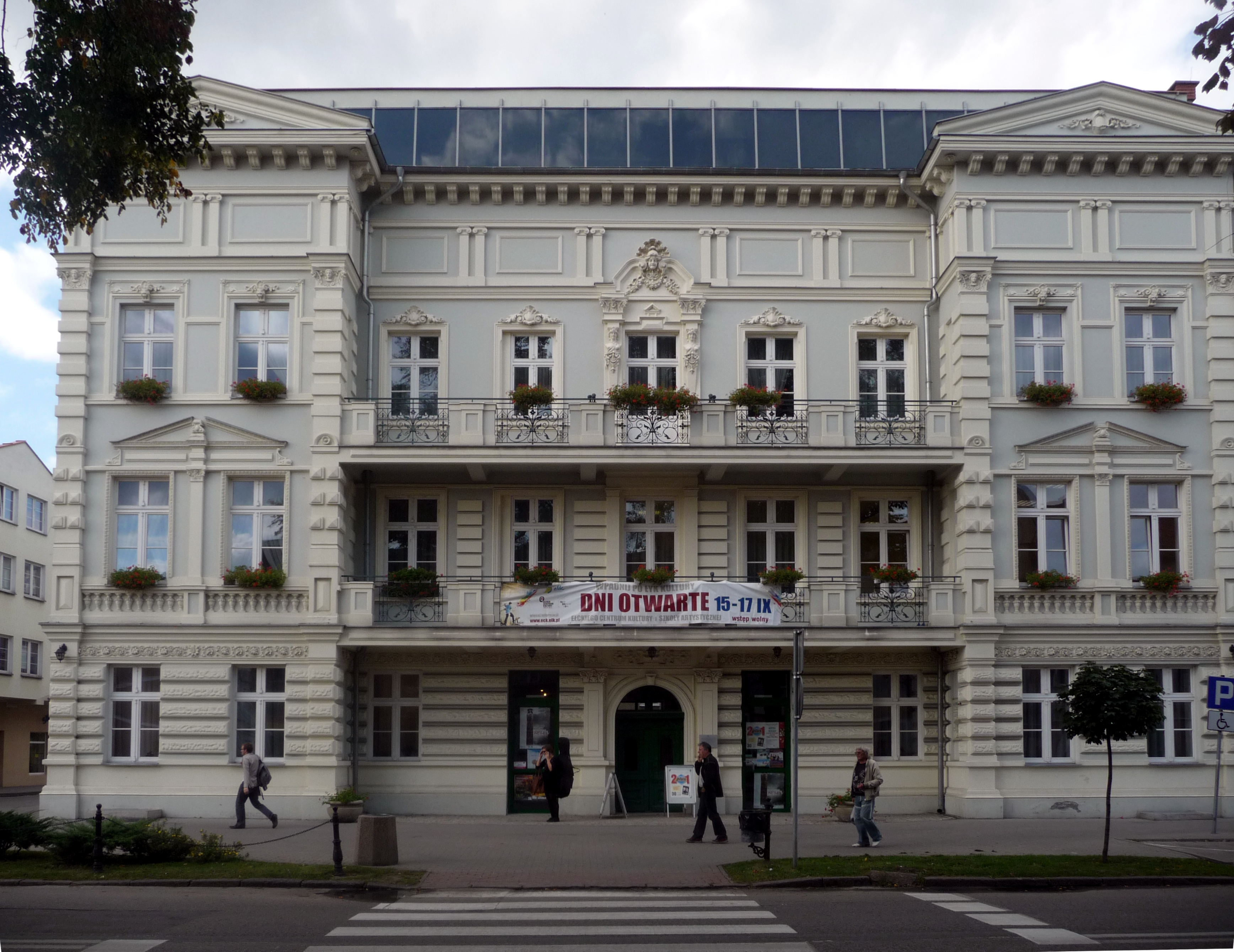 Polska